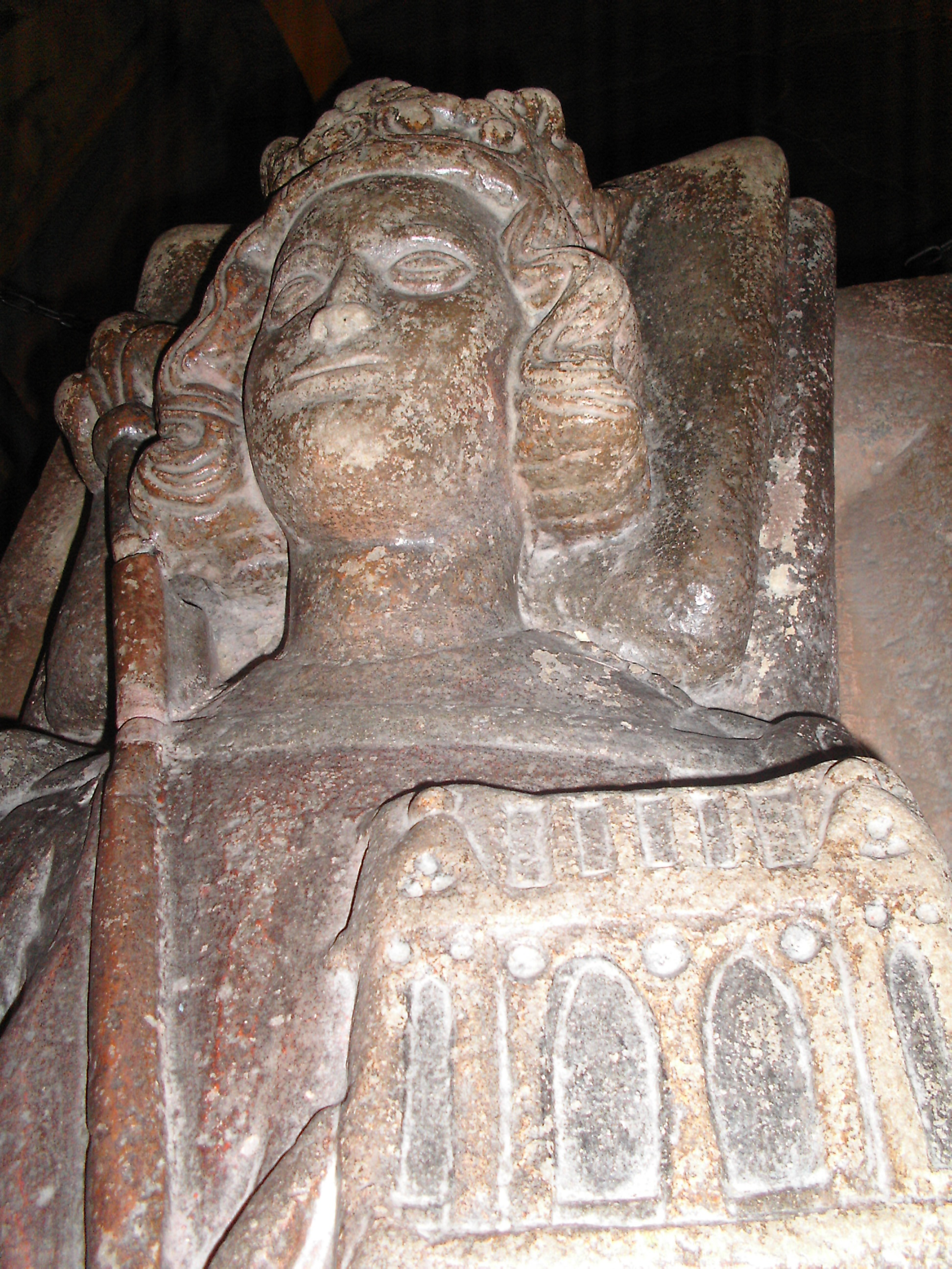 kaiser Heinrich III. der Salier